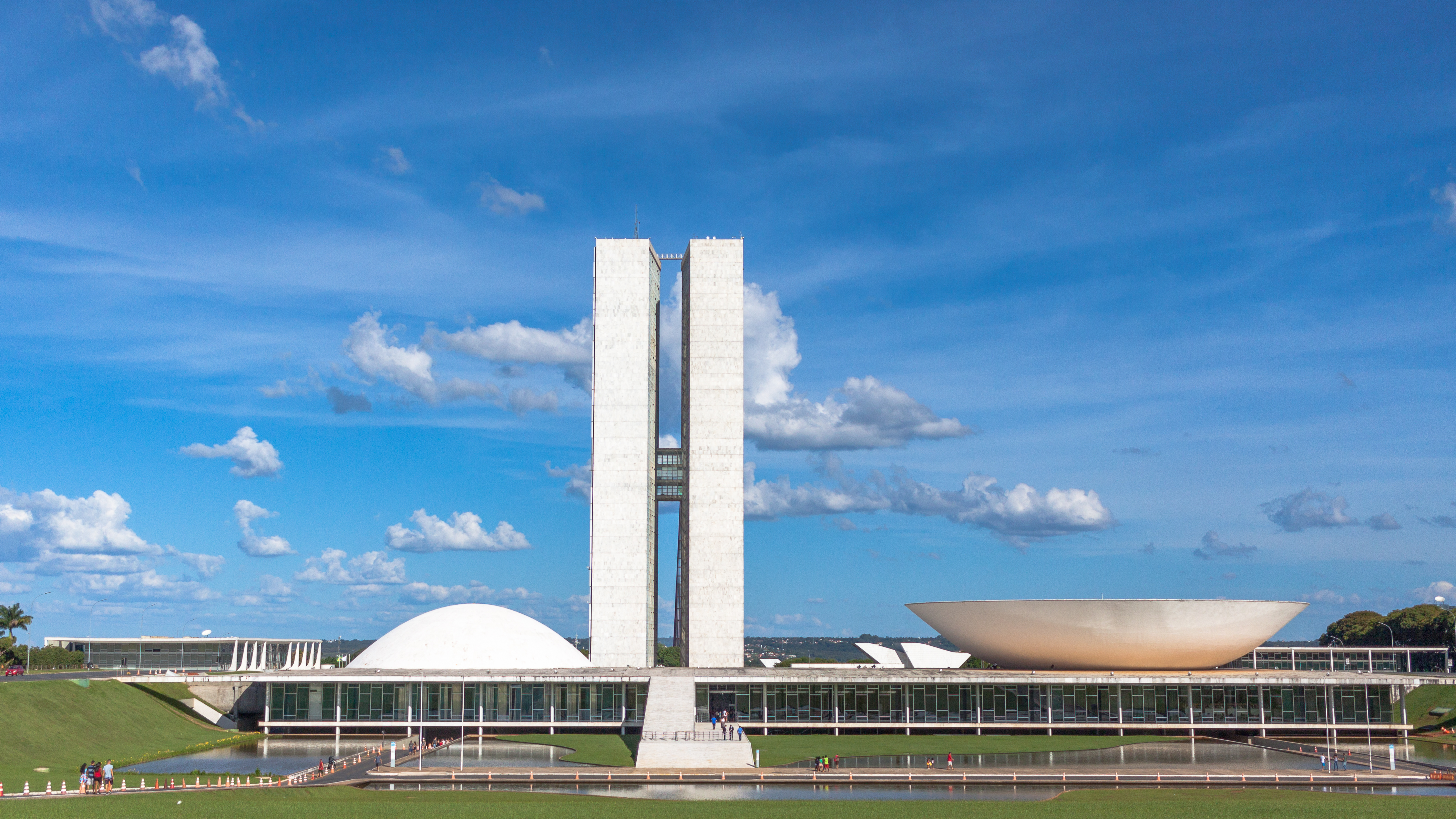 Congresso Nacional